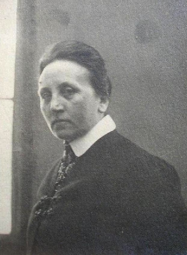 Hermína Laukotová, česká malířka a grafička